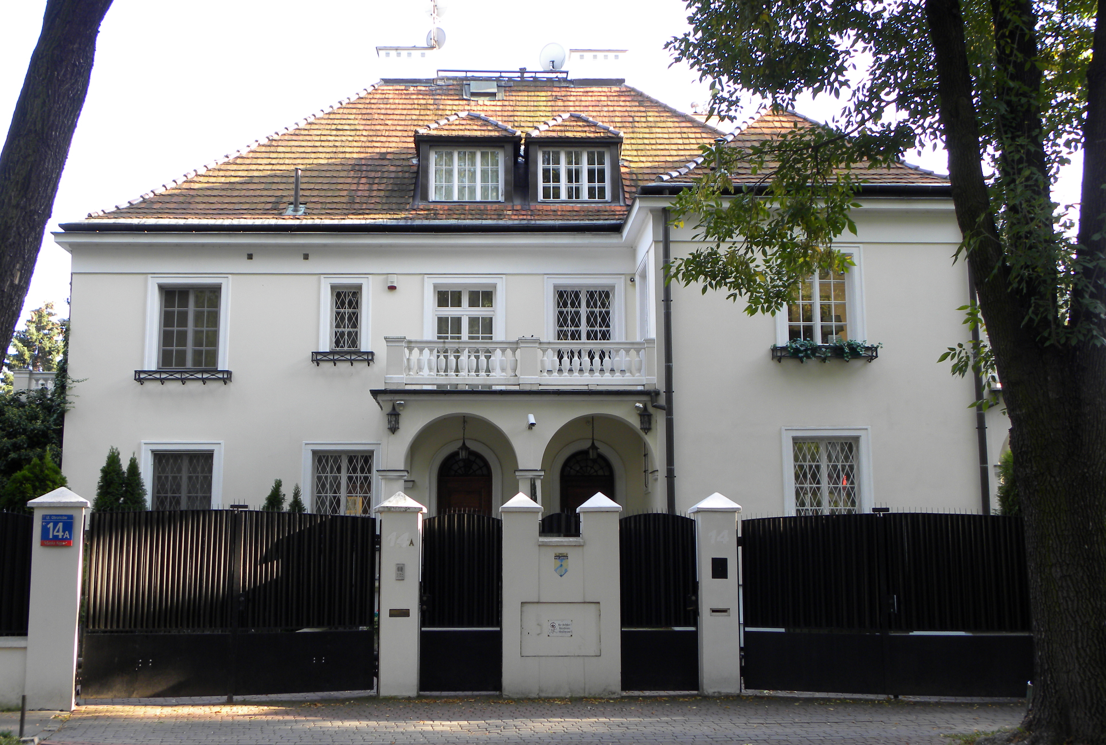 Dom z ok. 1930 ul. Obrońców 14 Warszawa, dz. Praga Południe